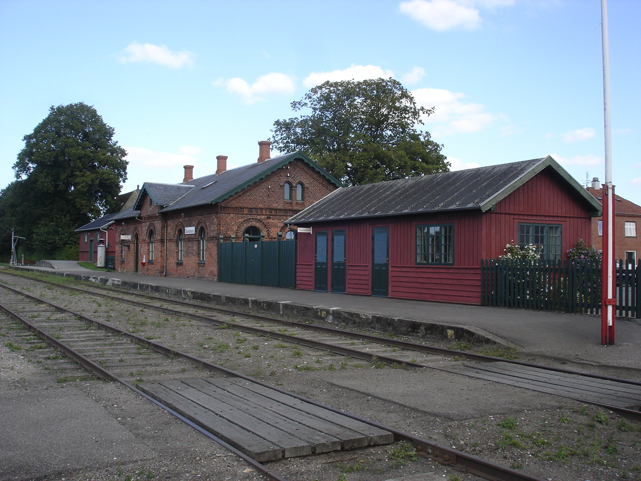 Bandholm Station fra sporsiden